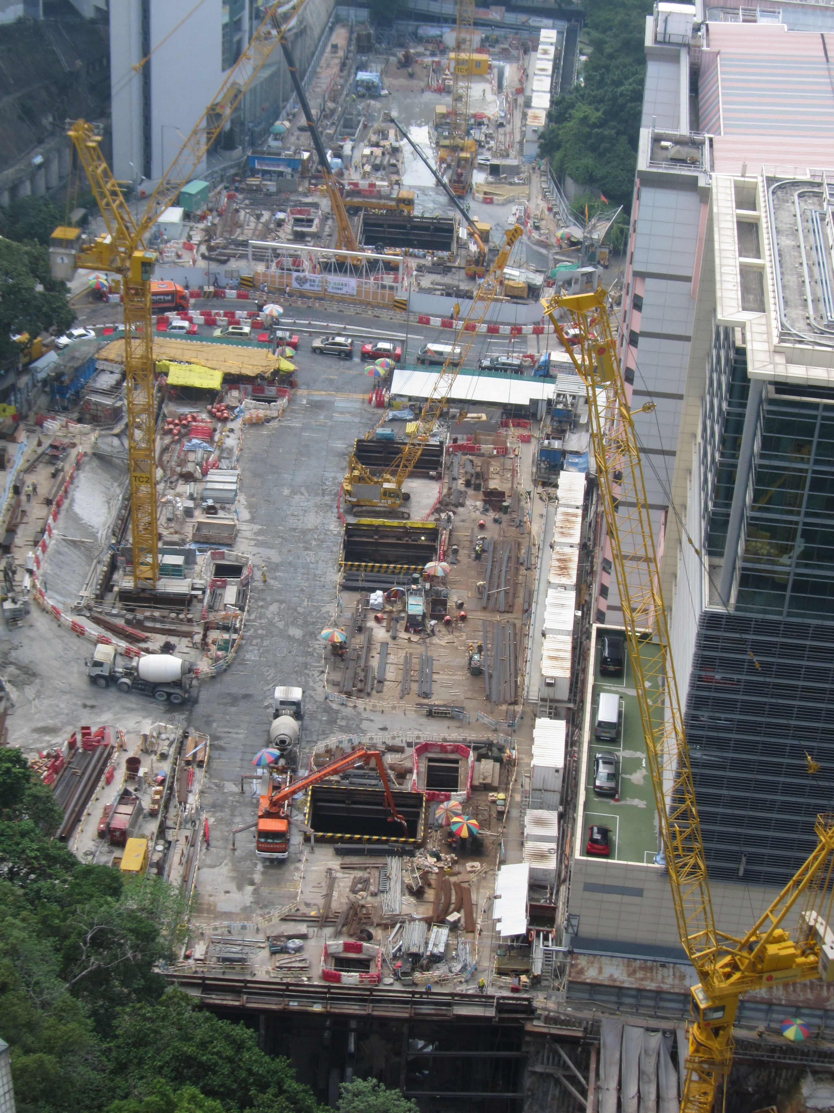 中文（香港）: 從翰林軒遠望之堅尼地城站近況